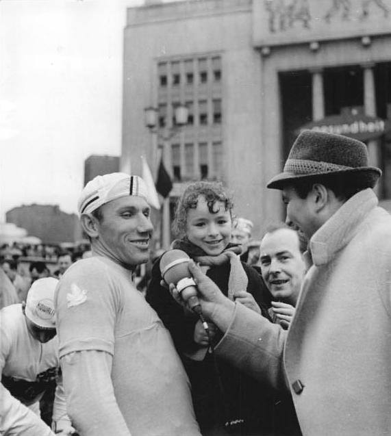 Zentralbild Kohls 4.5.1962 XV. Internationale Friedensfahrt 1962. 2. Etappe Berlin-Leipzig (3.5.62). UBz: Der DDR-Rundfunkreporter Heinz-Florian Oertel wünscht dem Träger des Gelben Trikots Anatoli Tscherepowitsch, der eine kleine Verehrerin auf dem Arm hält, kurz vor dem Ehrenstart am Zentralen Klub der Jugend und Sportler in der Berliner Karl-Marx-Allee ein erfolgreiches Abschneiden.